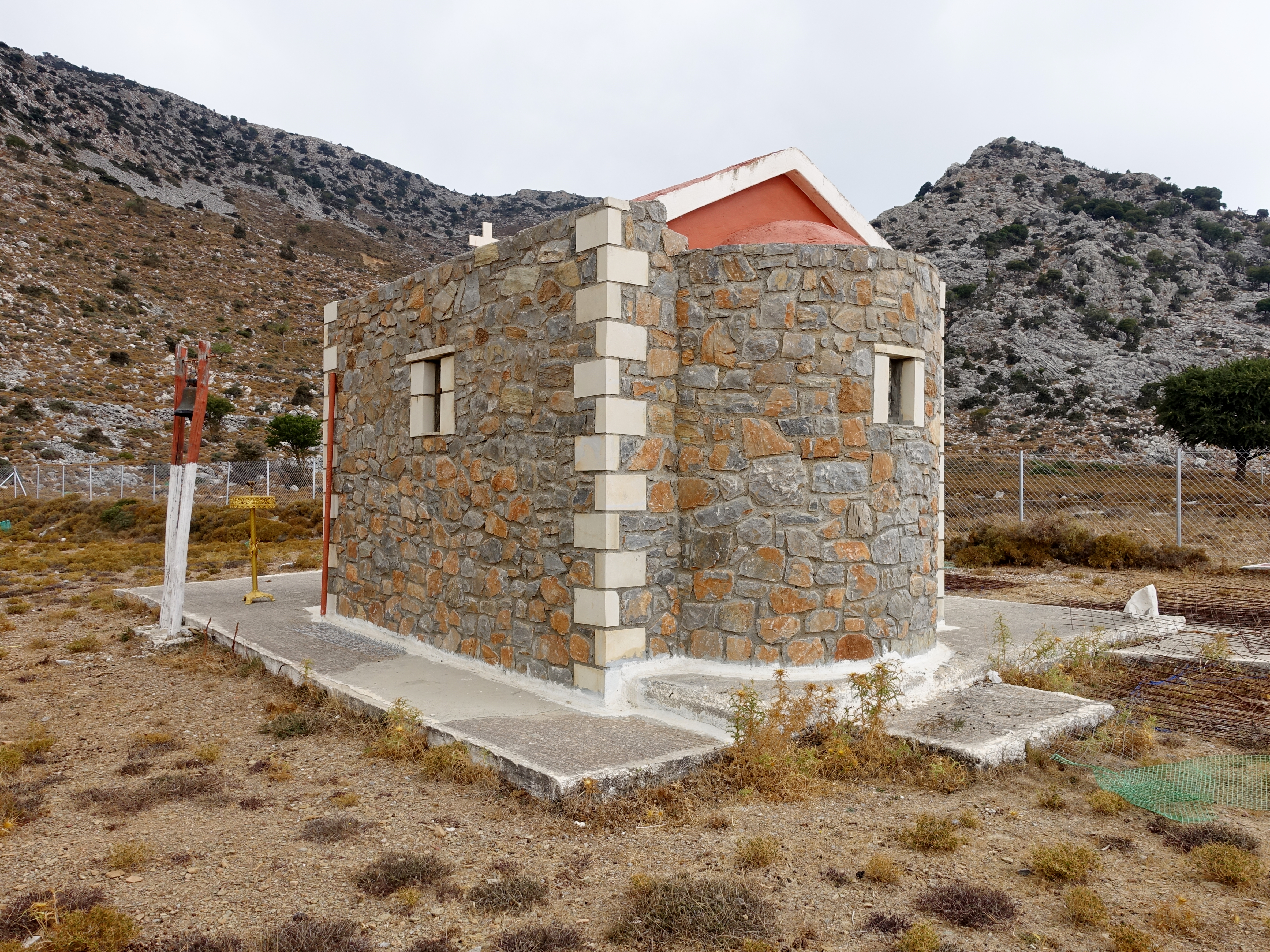 Kapelle Agia Ariadni (Αγία Αριάδνη) auf der Nisimos-Hochebene, Kreta, Griechenland